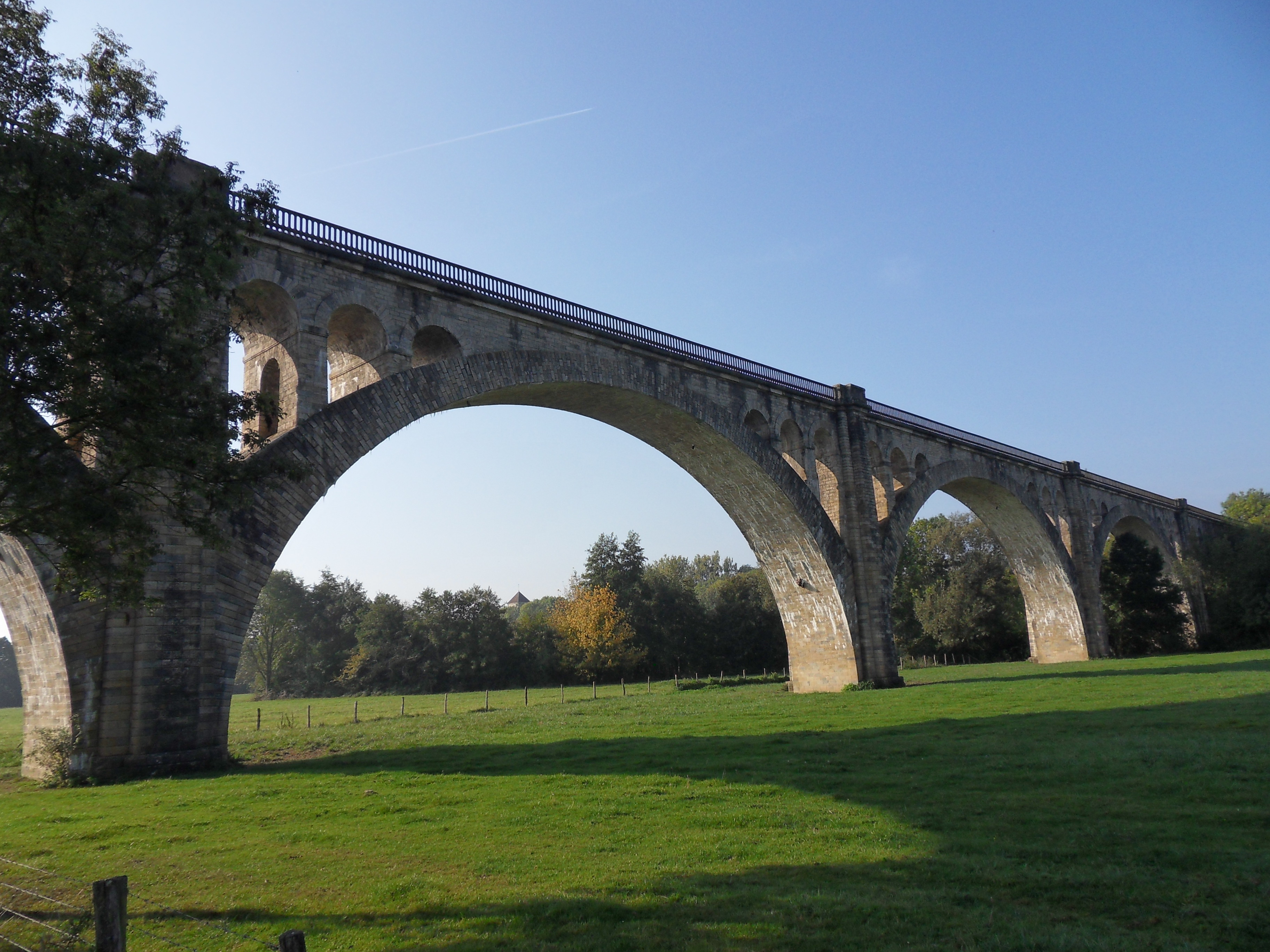 Oisilly, (Côte-d'Or) France. Le viaduc ferroviaire de la ligne désaffectée de Ligne de Saint-Julien à Gray. longueur : 294 m., hauteur : 20 m. ; 7 arches